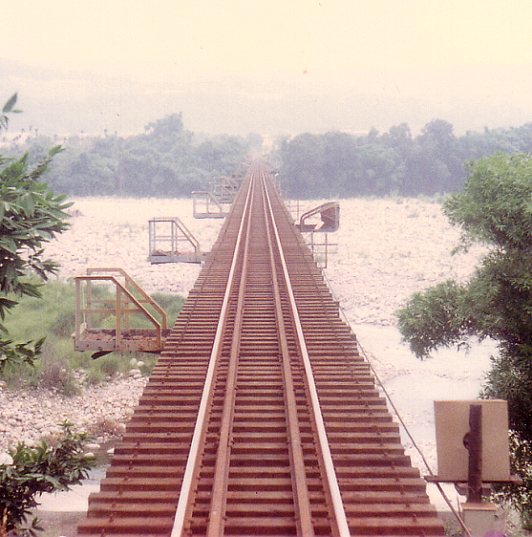 東勢線大甲溪橋